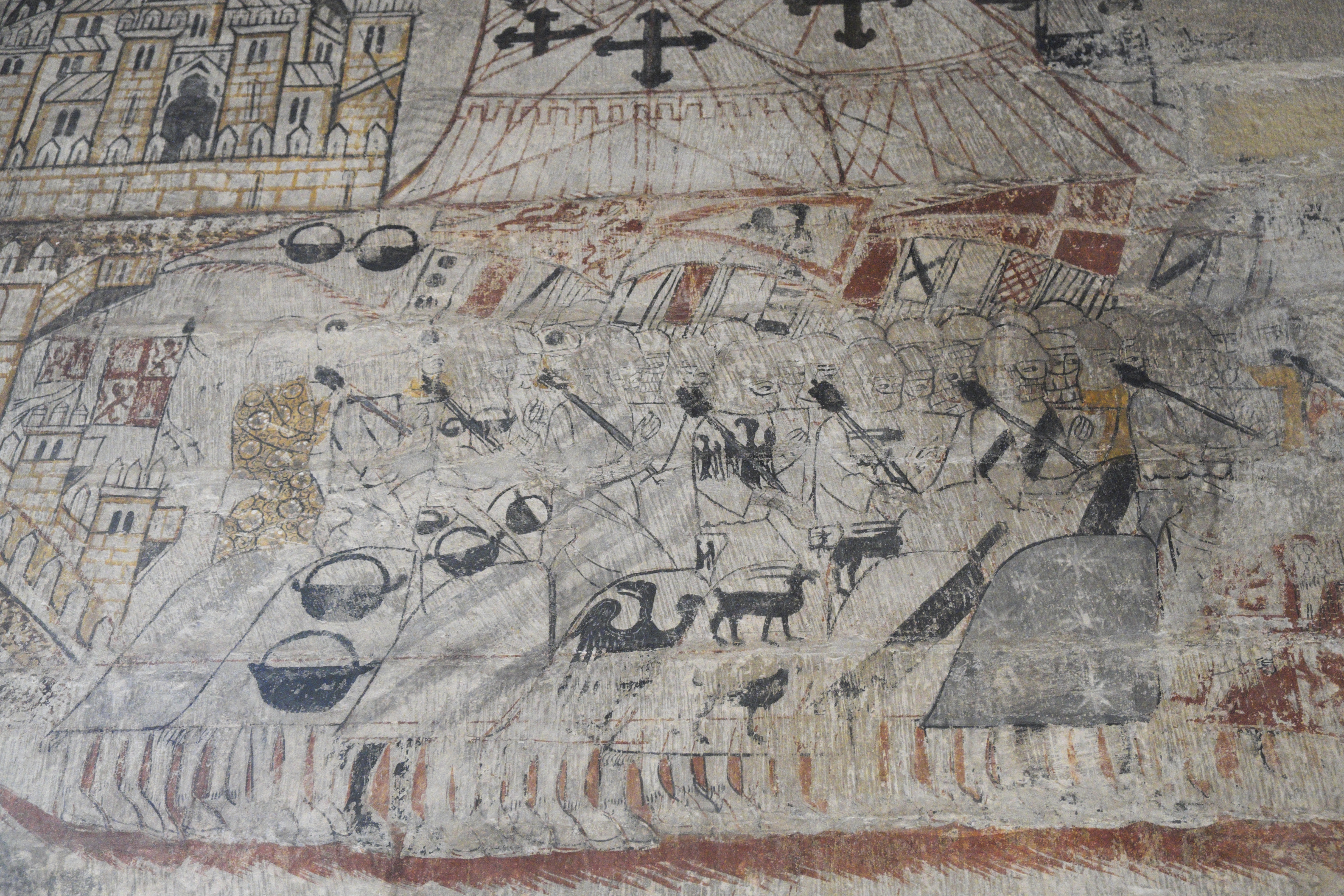 Castillo-Convento von Alcañiz in der Provinz Teruel (Aragonien/Spanien), Wandmalerei im Obergeschoss der Torre del Homenaje